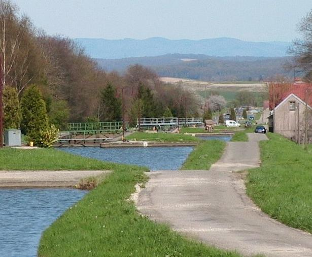 Canal Rhin Rhone à Valdieu-Lutran (68) échelle d'écluse et forêt noire Photo prise le 23/04/2006 par F5ZV